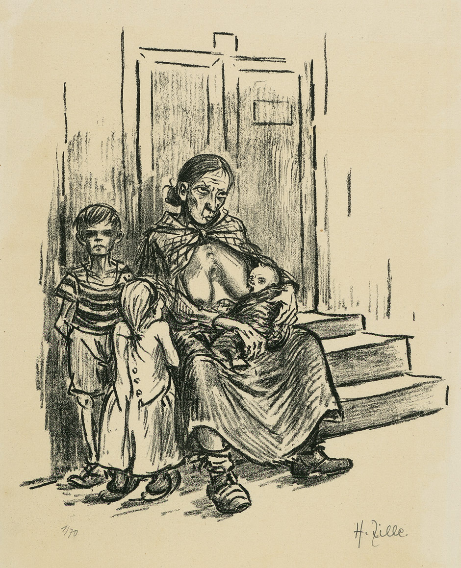 Hunger, Lithographie 24,7 x 21,7 cm (Darstellung), 1924